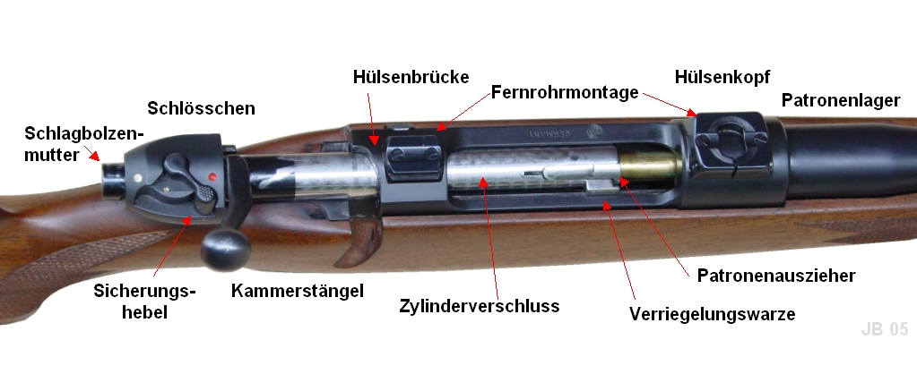 Repetiersystem mit Bezeichnungen äcker 2005/09/27Grafik Joachim Ba